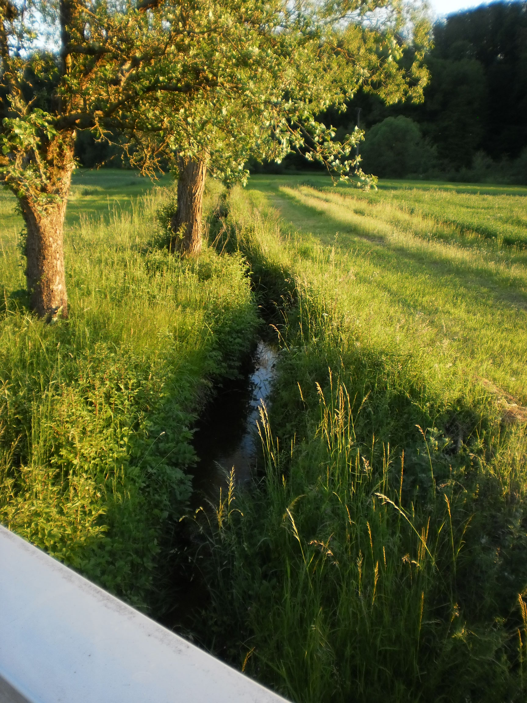 Cyriaxweimarer Bach nahe der Mündung in die Allna, 2019-06-02.